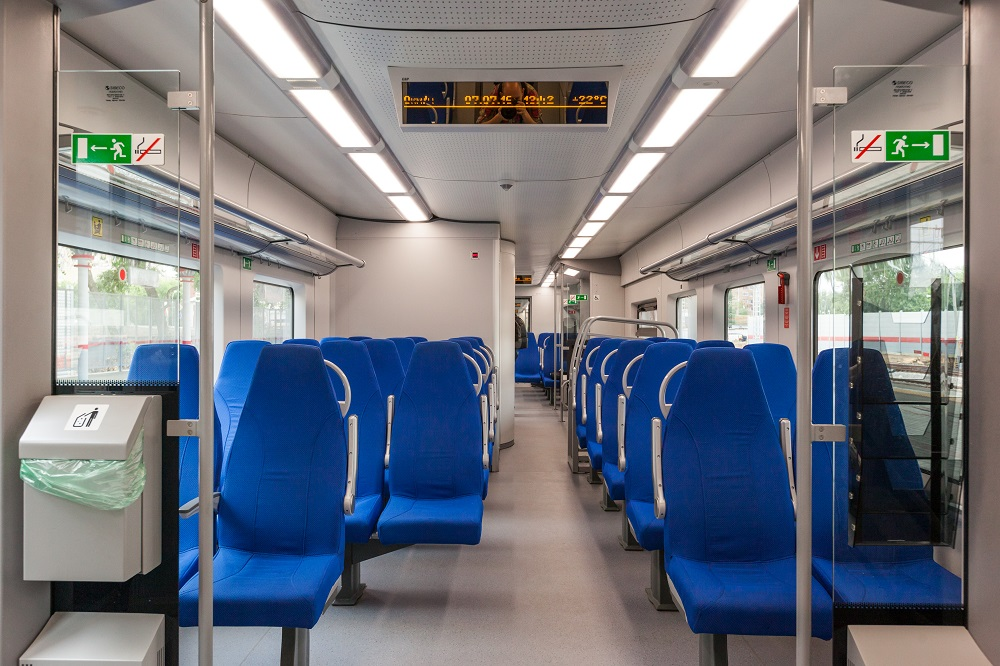 Салон головного вагона электропоезда ЭС2Г